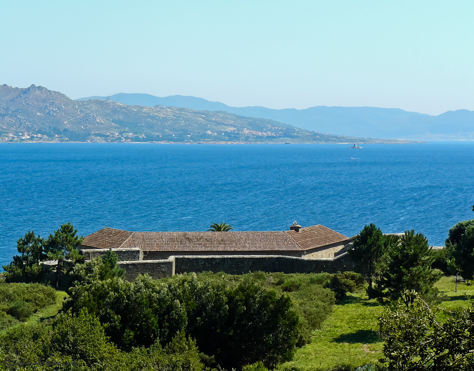 Castelo do Cardeal en Corcubión